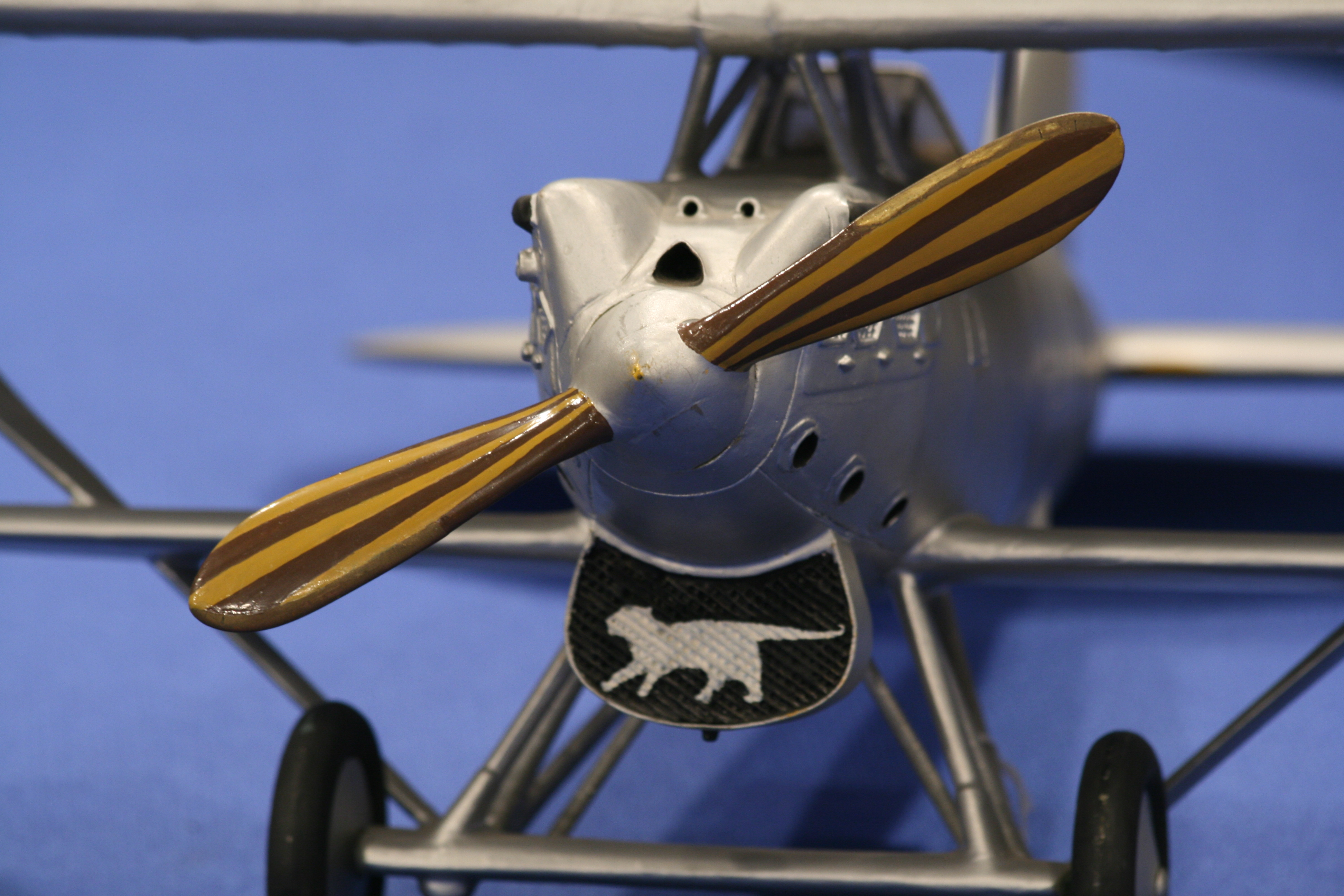 Caza Nieuport-Delage NiD-52 de las Fuerzas Aéreas de la República Española. Combatió en el bando republicano durante la Guerra Civil Española (1936-1939). Maqueta del Museo del Aire de Cuatro Vientos (Madrid) exhibida en una exposición del Ejército del Aire español en el centro comercial El Corte Inglés de Vigo (Galicia, España). Nieuport-Delage NiD-52 (1929). Fighter Nieuport-Delage NiD-52 of the Spanish Republic Air Forces. It fought in the republican band during the Spanish Civil War (1936-1939). Model of the Museum of the Air of Cuatro Vientos (Madrid) exposeed in an exhibition of the Spanish Air Army in the commercial center El Corte Inglés of Vigo (Galicia, Spain).